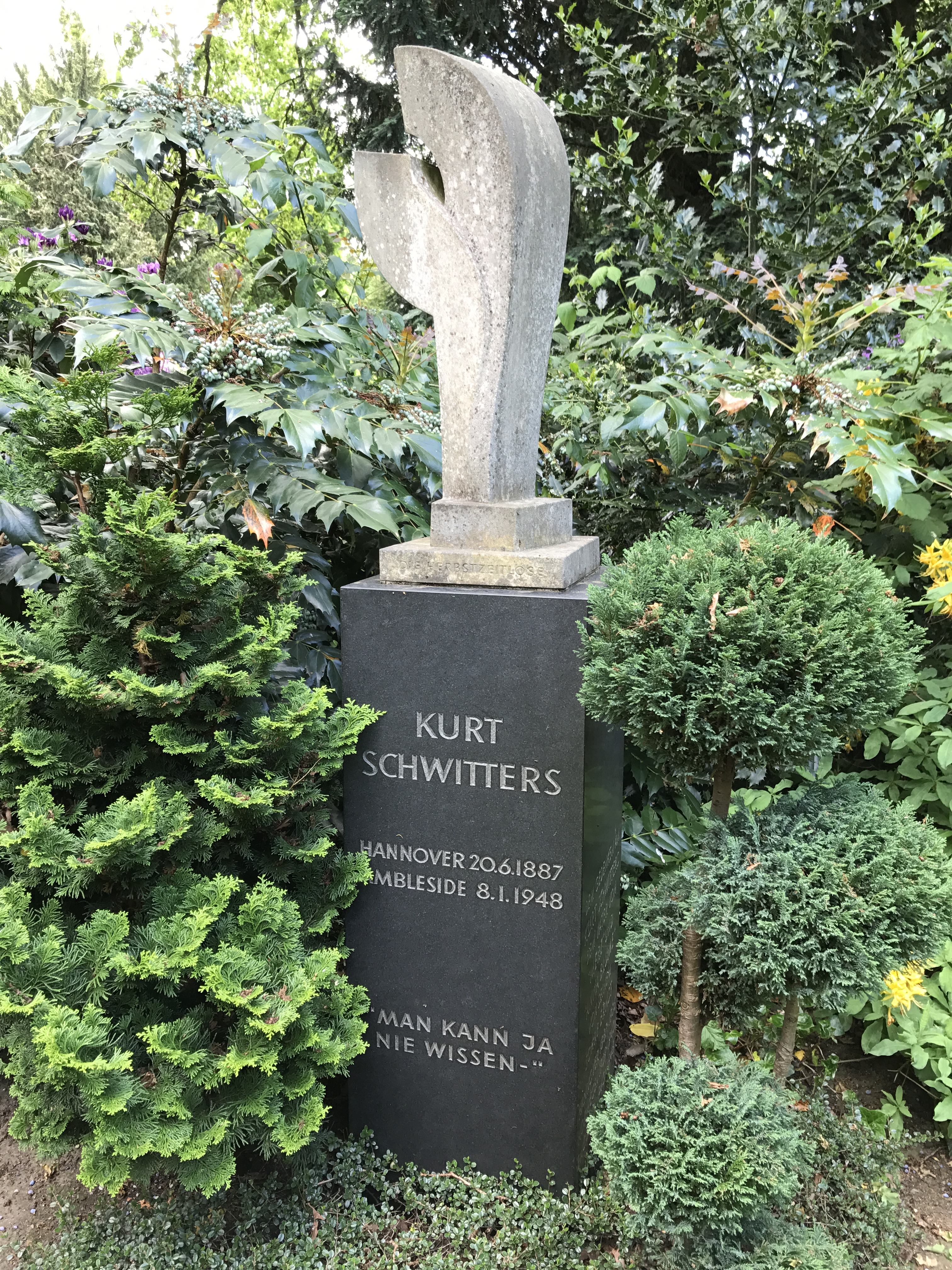 Grabmal von Kurt Schwitters auf dem Stadtfriedhof Engesohde in Hannover.